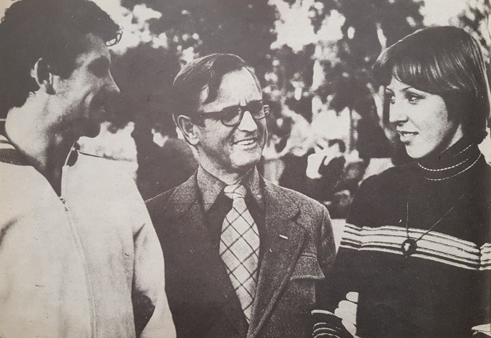 Prezes LKS Pomorze Stargard Erwin Kujawski